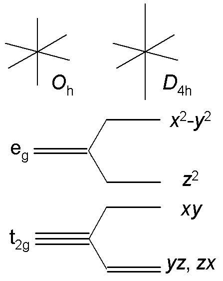 八面体配位から平面四角形配位への配位子場分裂